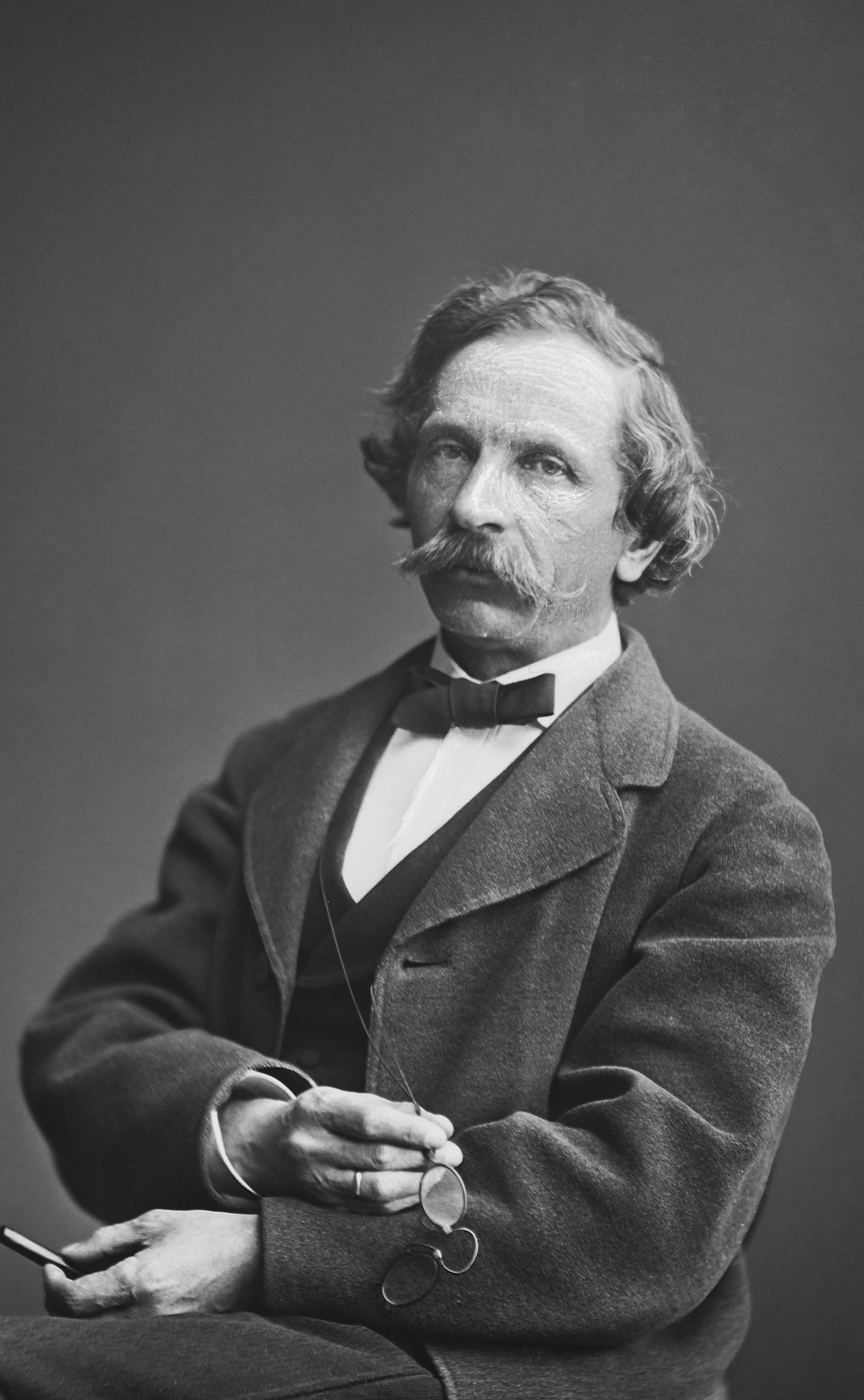 saksan kielen lehtori, muusikko Herman Paul